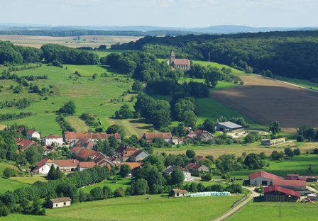 Molay Haute-Saône vue depuis la montagne de la roche